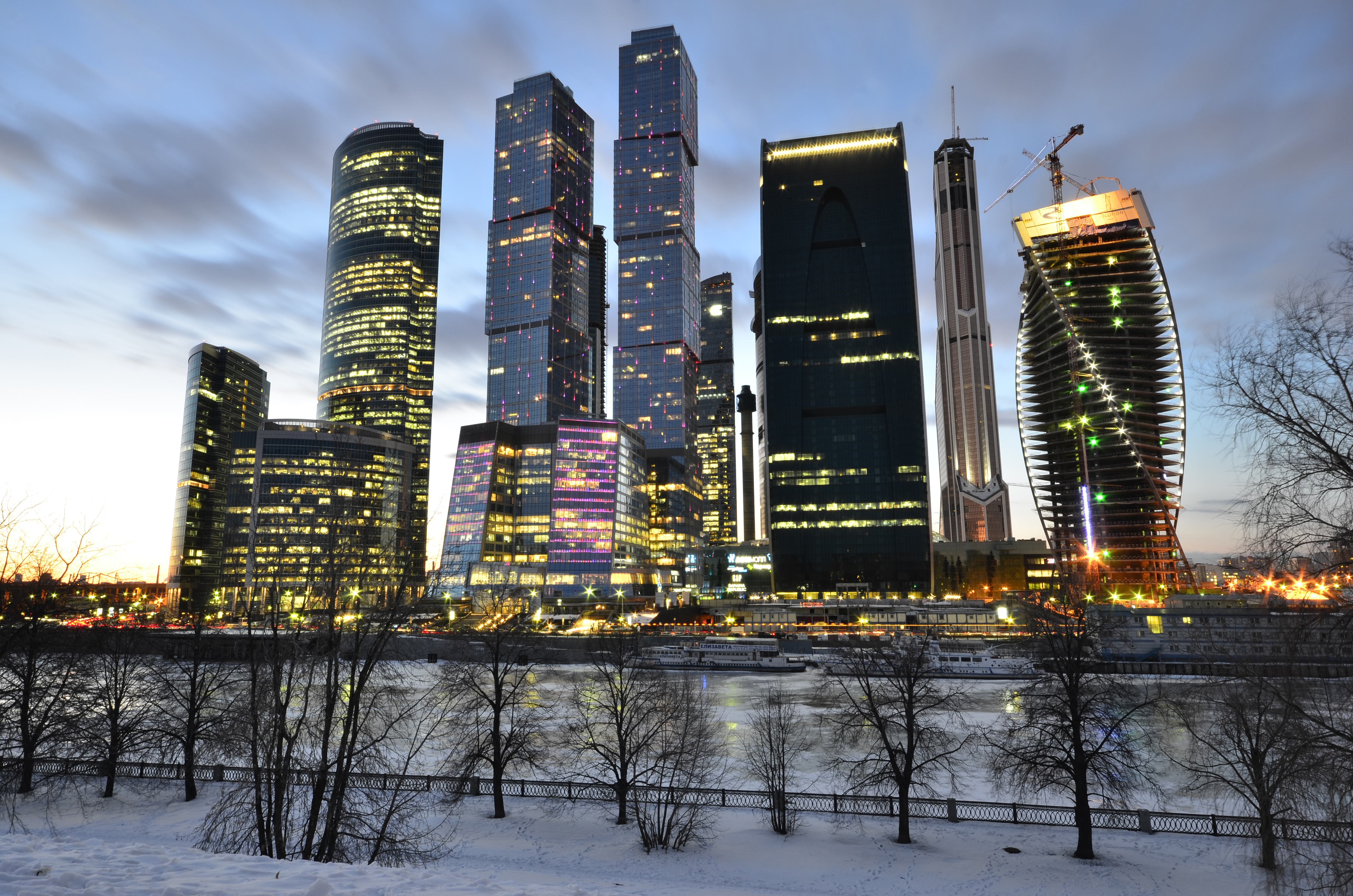 Москва-Сити 2 Апреля 2013 Год